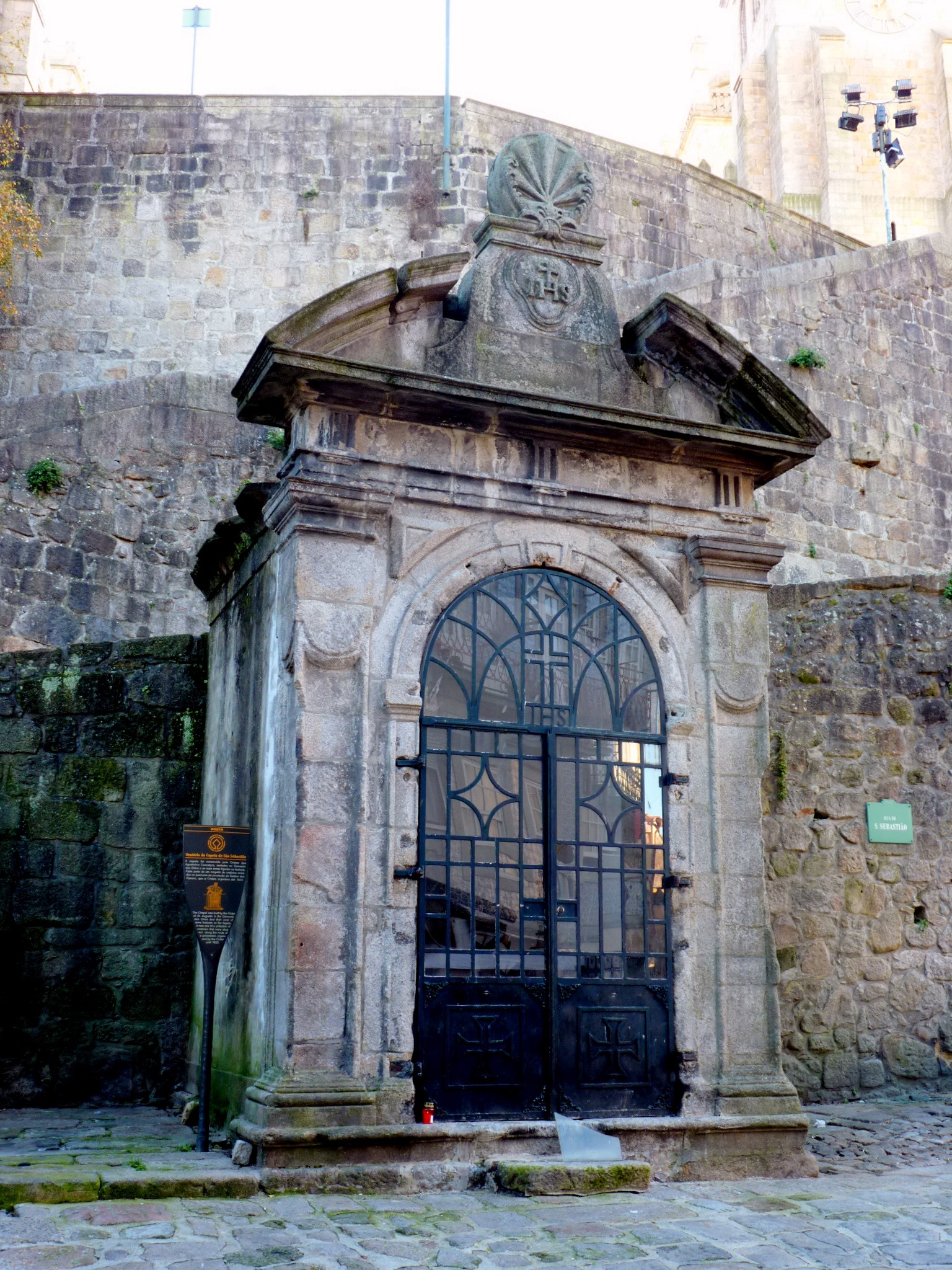 Capela do Senhor dos Passos / Passos da Via Sacra / Oratório da Capela de São Sebastião. Rua Escura, Sé, Porto, Portugal.